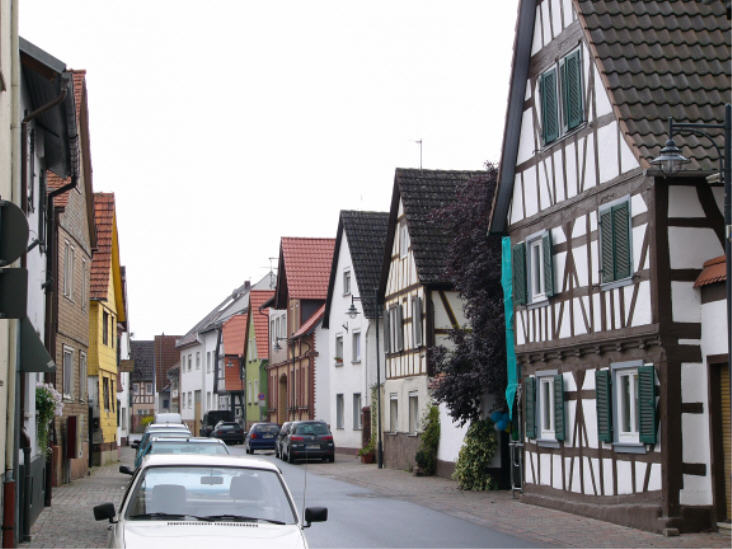 Altheim